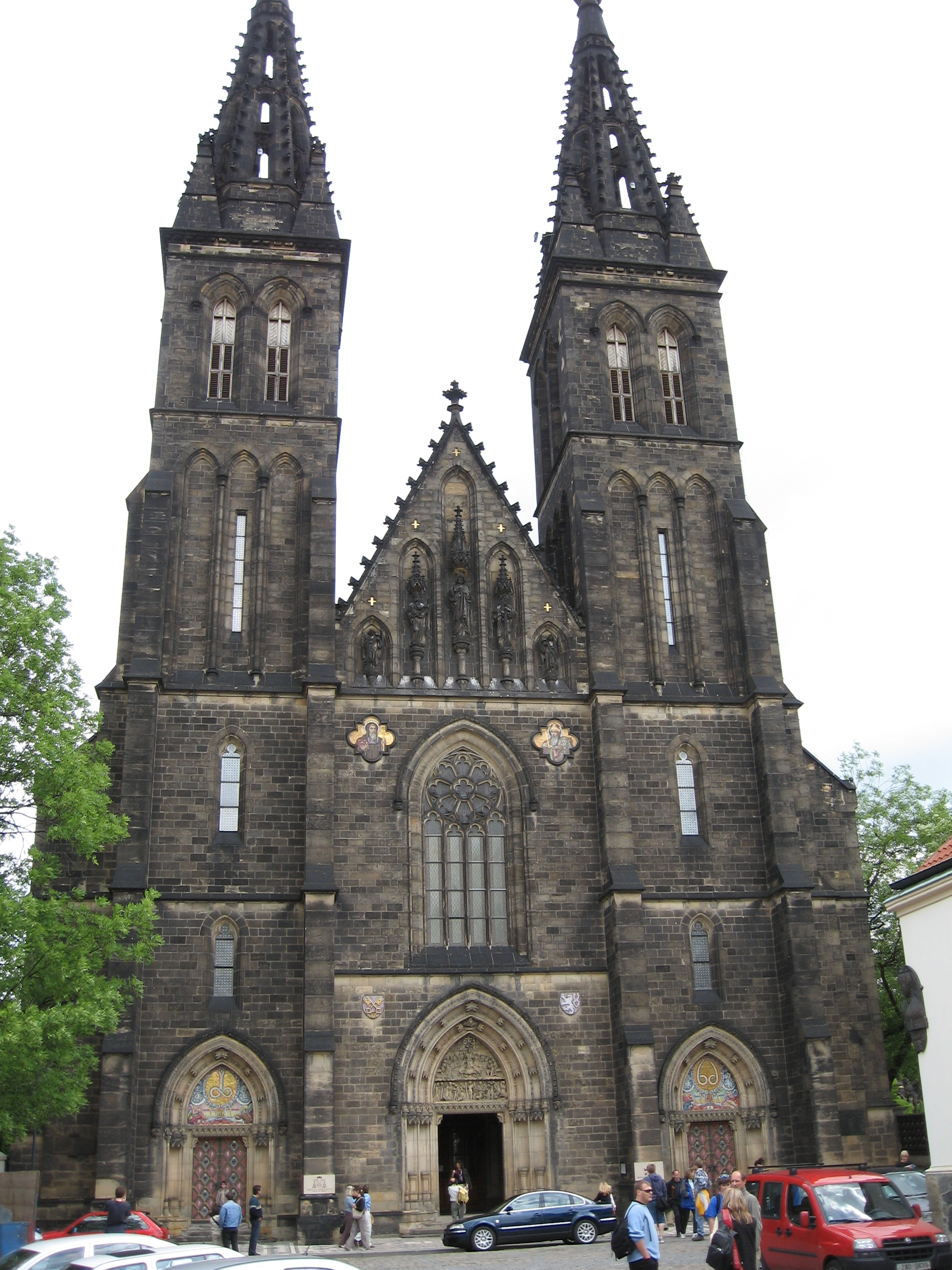 Kapitulní chrám sv. Petra a Pavla na pražském Vyšehradě